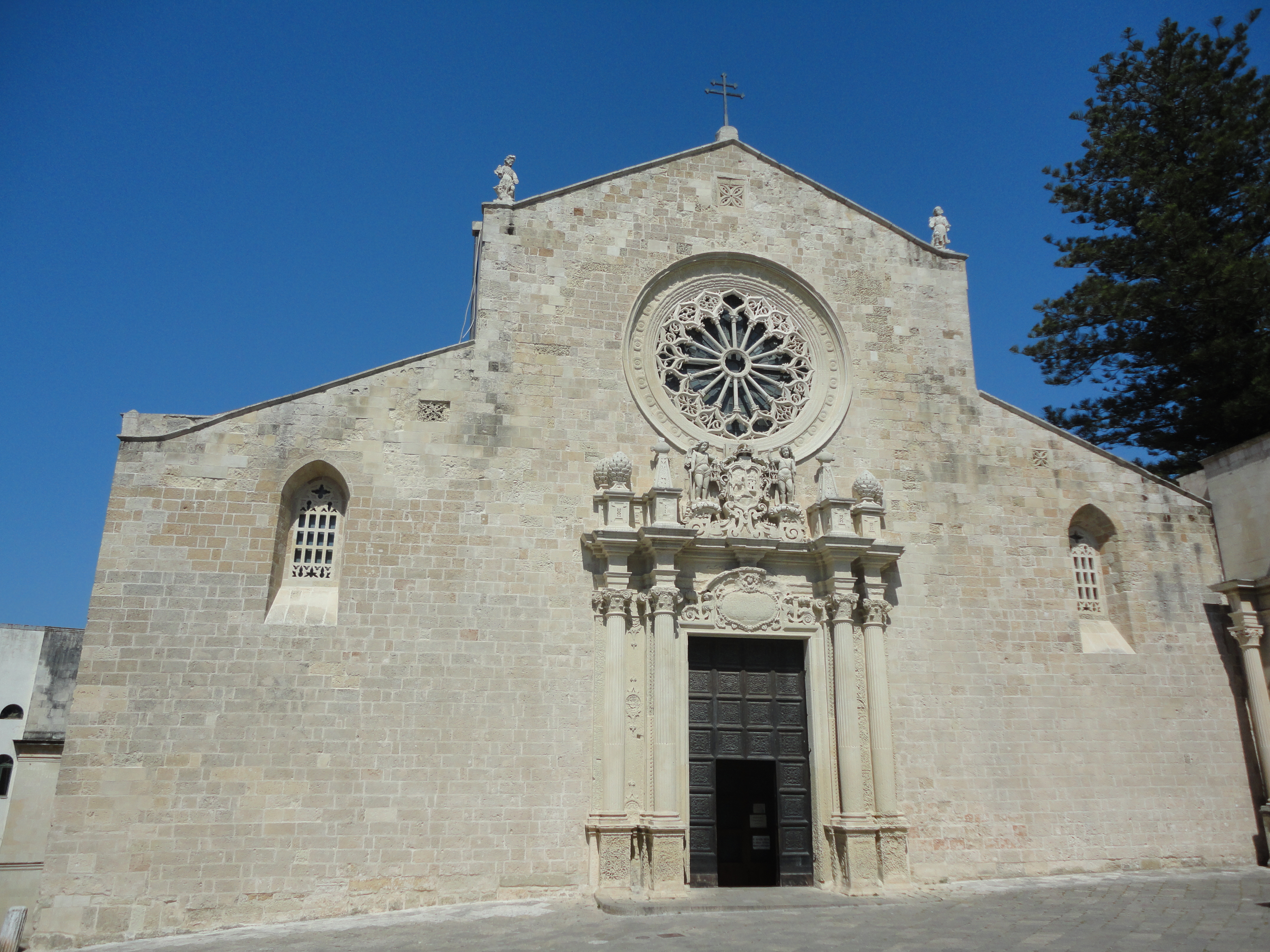 Cattedrale di Otranto, Lecce, Puglia